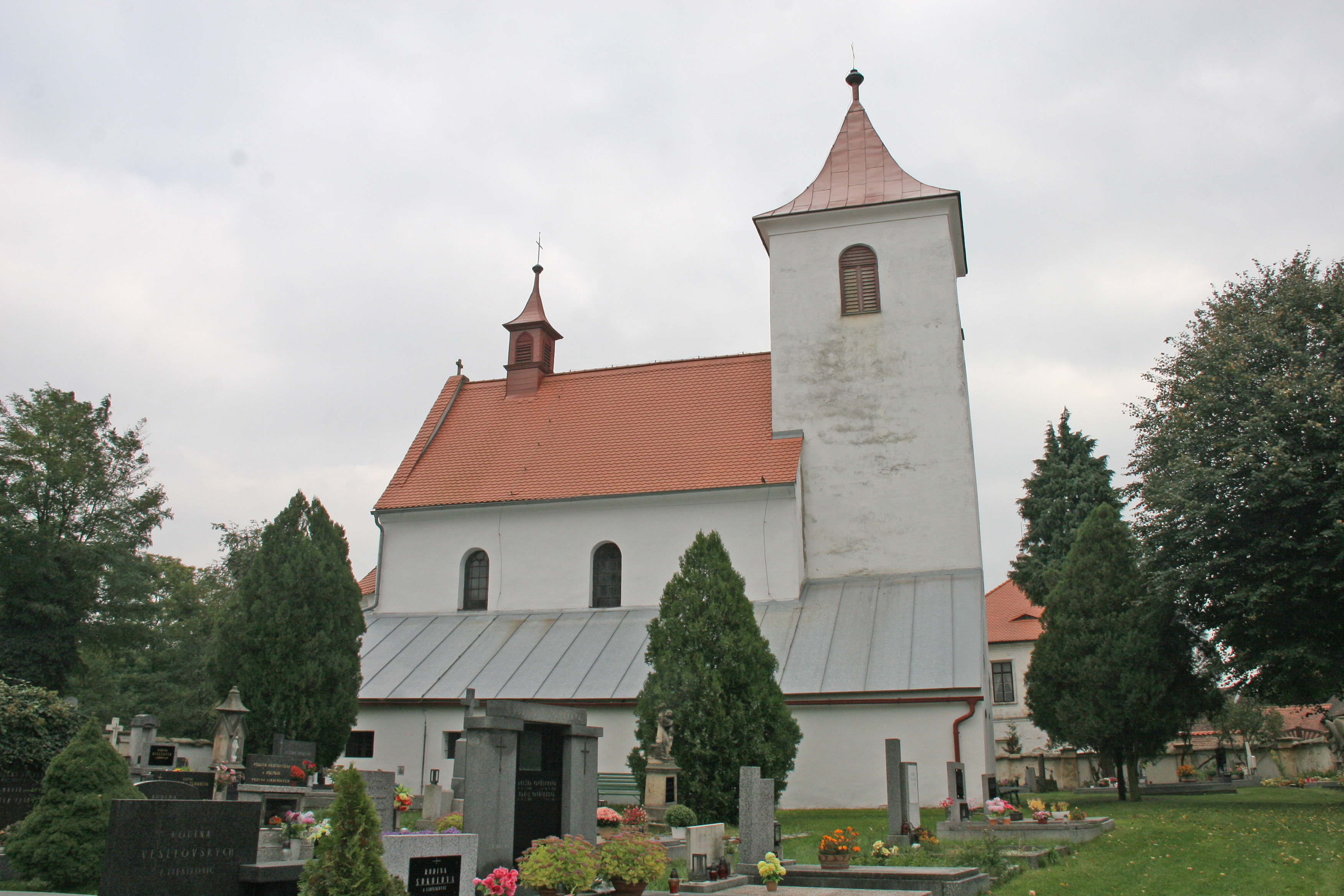 Kostel svatého Jakuba, Vysoký Újezd (okres Hradec Králové).